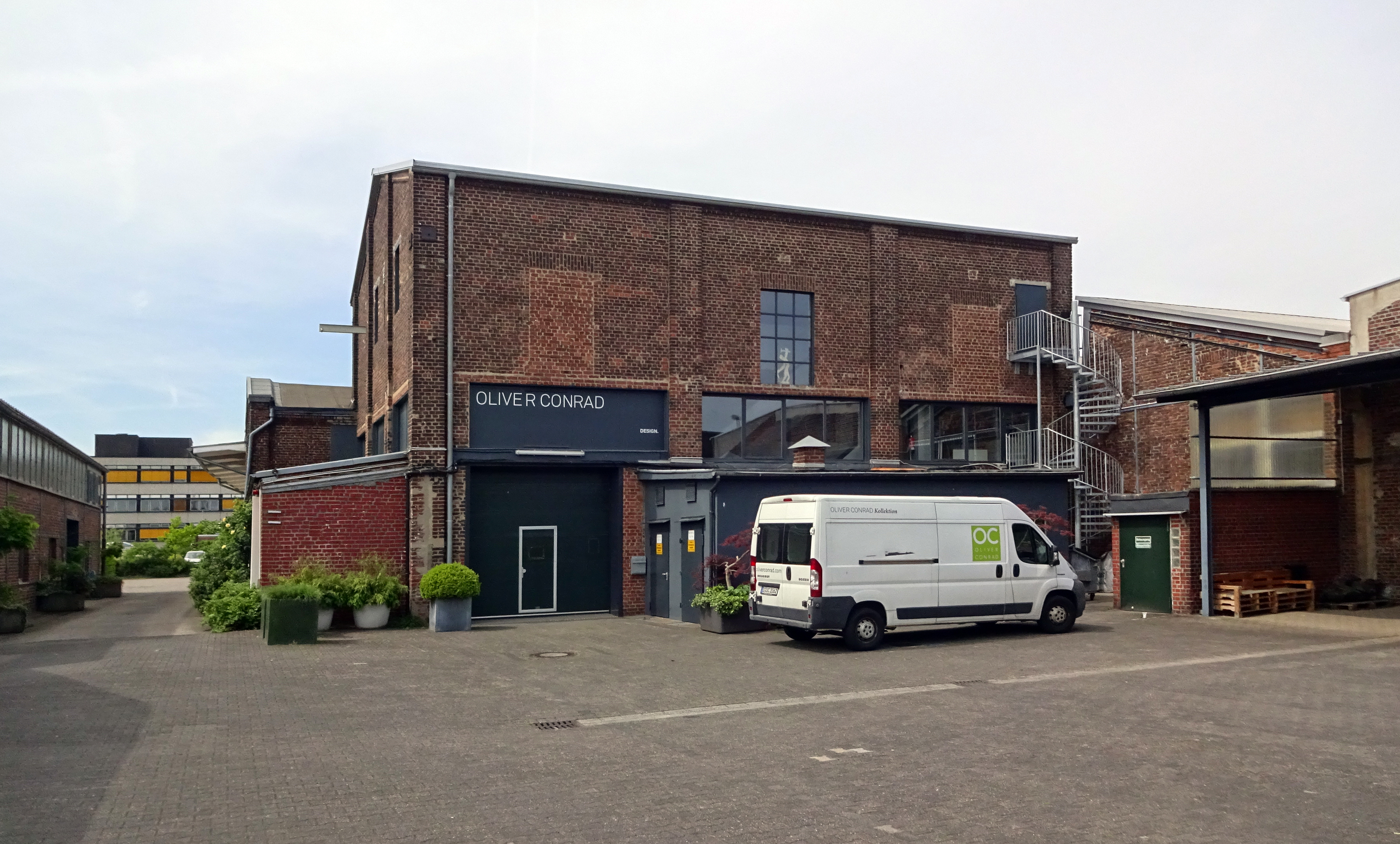 Oliver Conrad, Heesenstraße 74, Düsseldorf-Heerdt